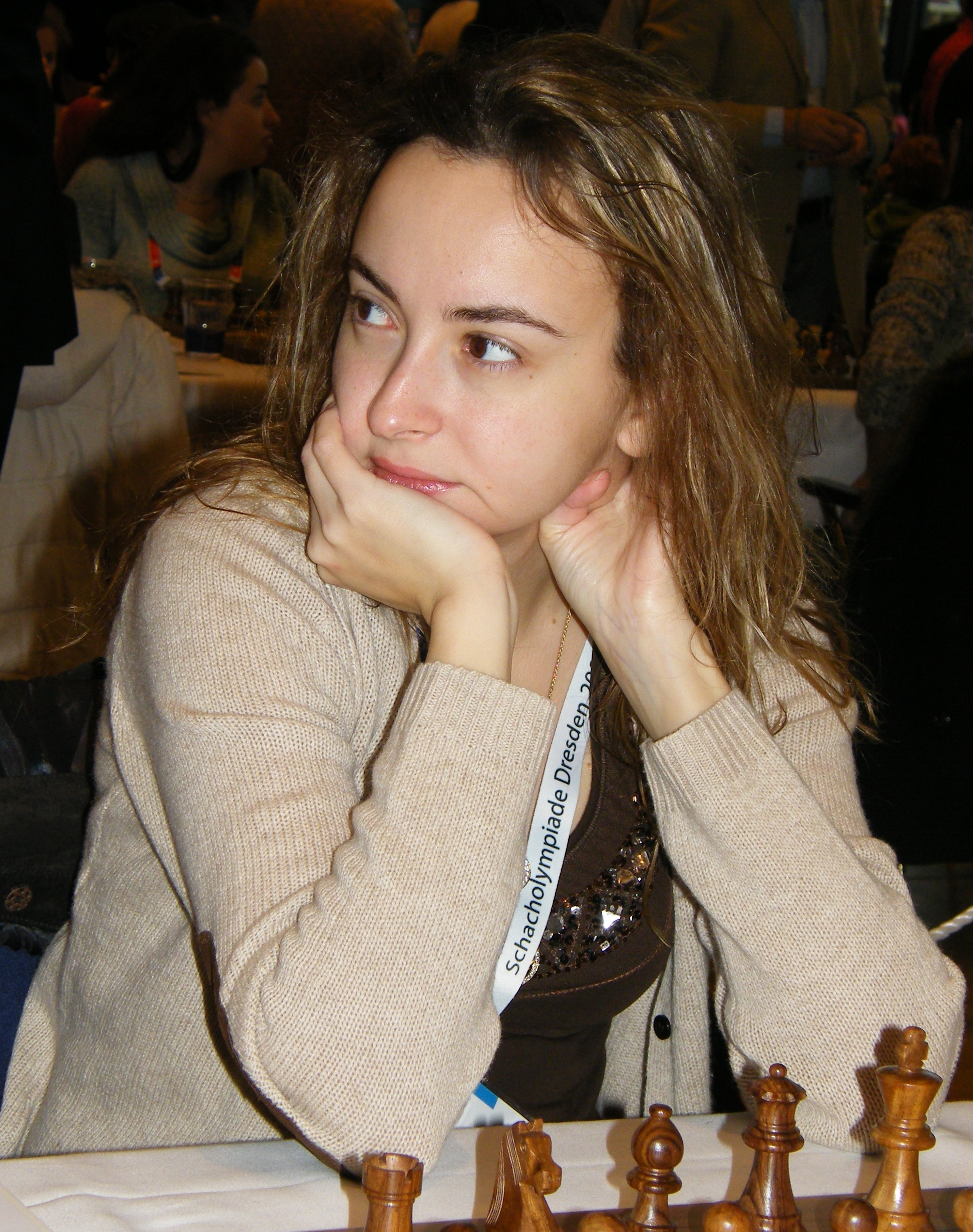 Antoaneta Stefanowa bei der 38. Schacholympiade in Dresden 2008